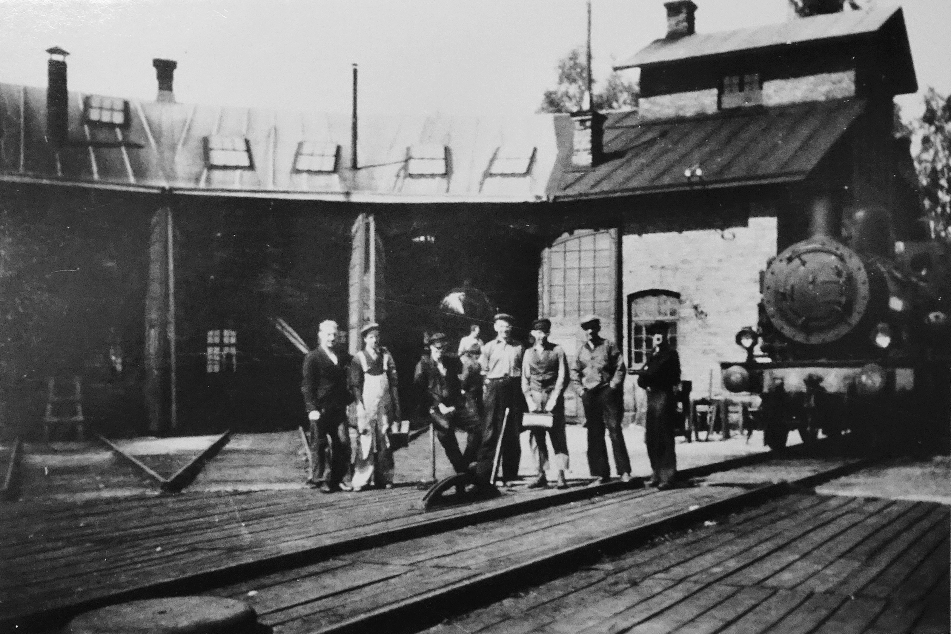 Lokstallet